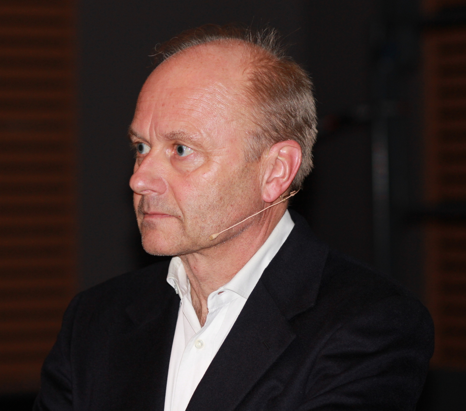 Finn Skårderud psykiater, forfatter, professor og kritiker under Schizofrenidagene i Stavanger